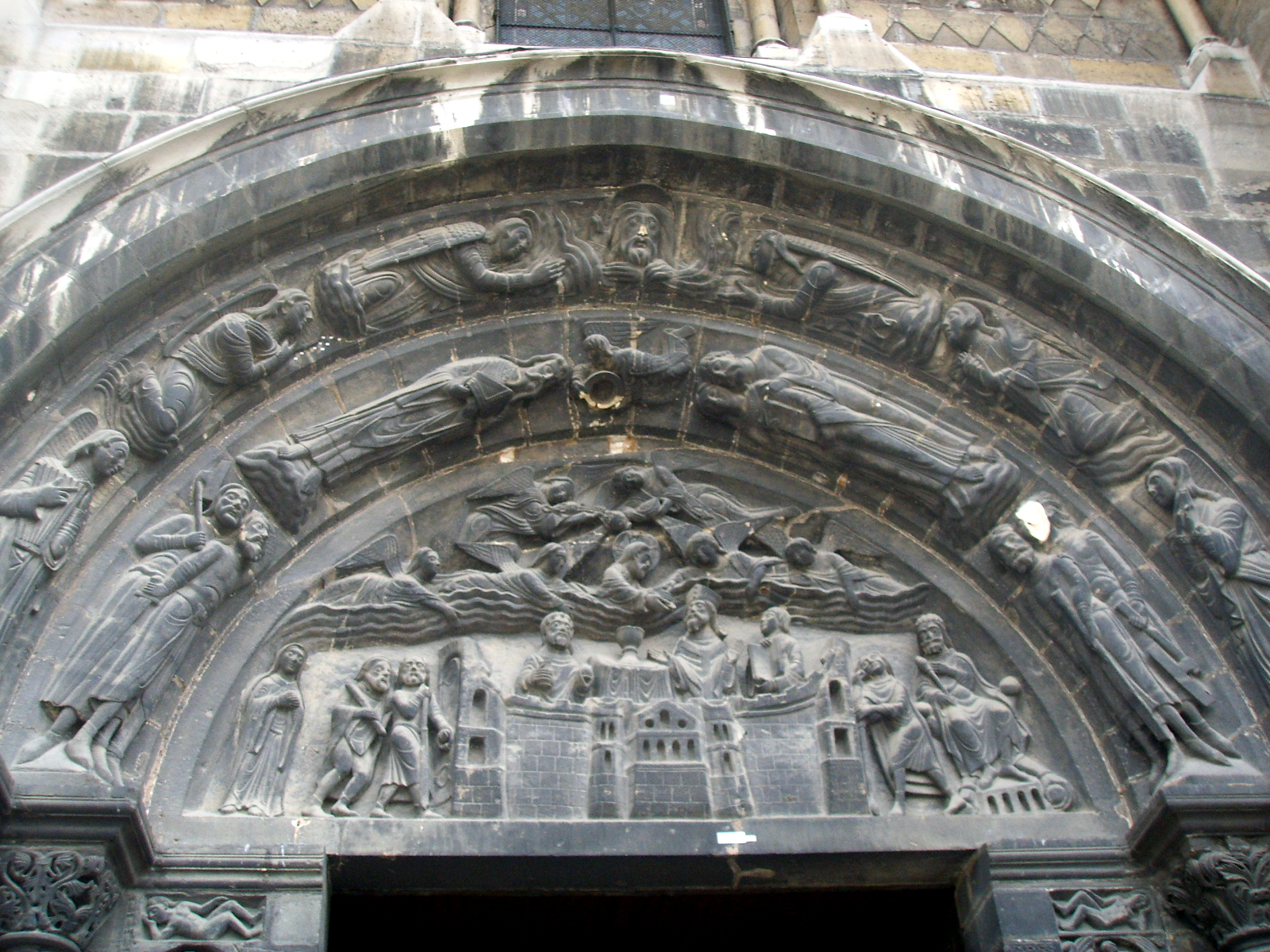 Saint-Denis - Basilique Saint-Denis - Façade occidentale - Portail de droite : tympan représentant la dernière communion de saint Denis. Restauré par Joseph-Sylvestre Brun. Basilica_di_saint_Denis portale Paris